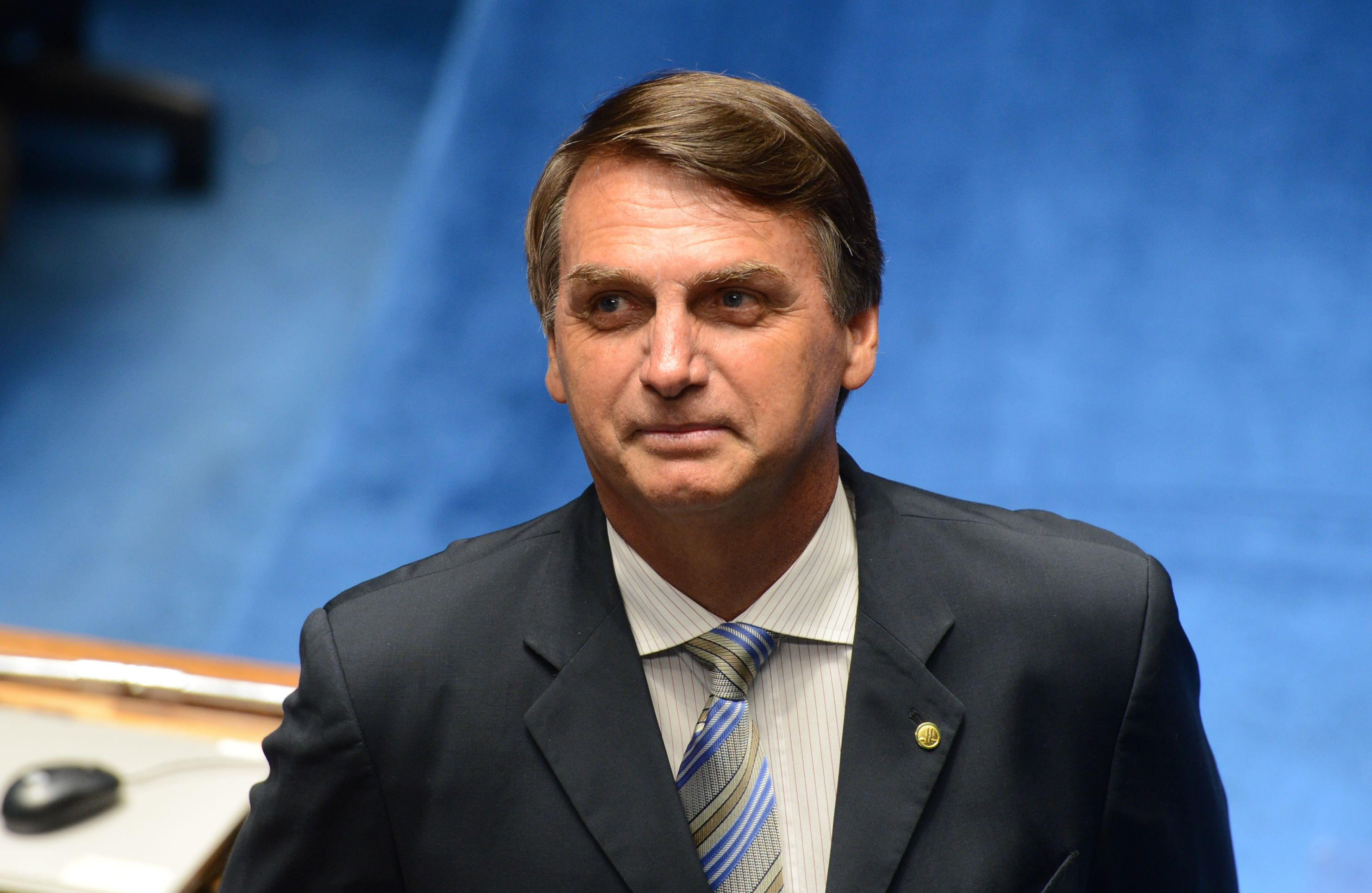 O deputado Jair Bolsonaro durante promulgação da Emenda Constitucional 77, que permite médicos militares trabalharem no SUS (Antonio Cruz/Agência Brasil)